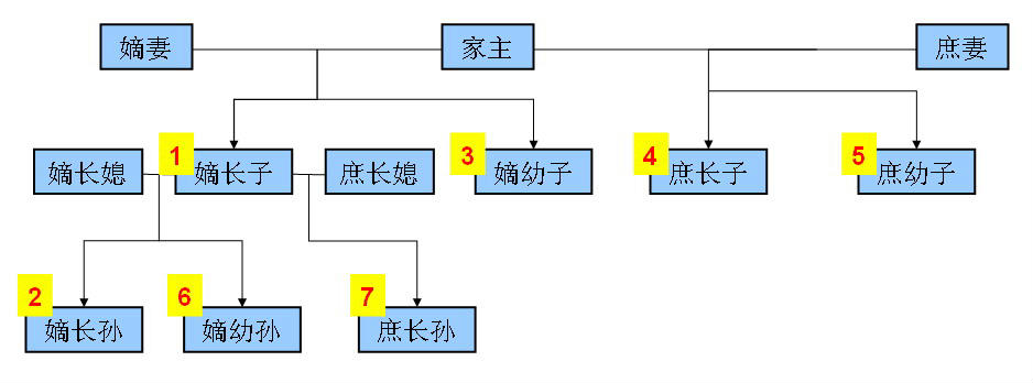 中国古代继承制度